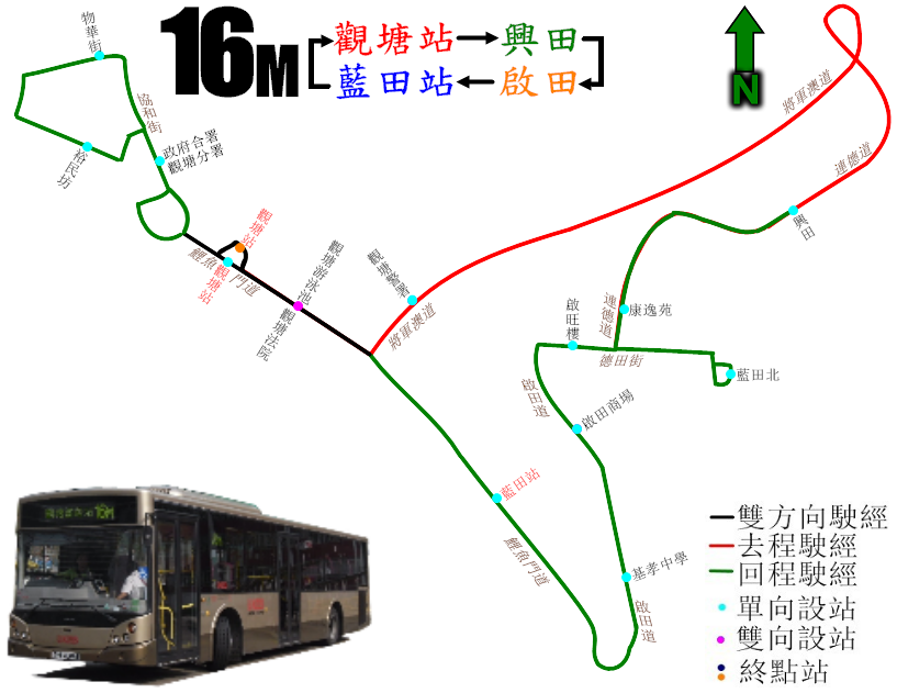 中文（香港）: 九巴16M線的走線圖